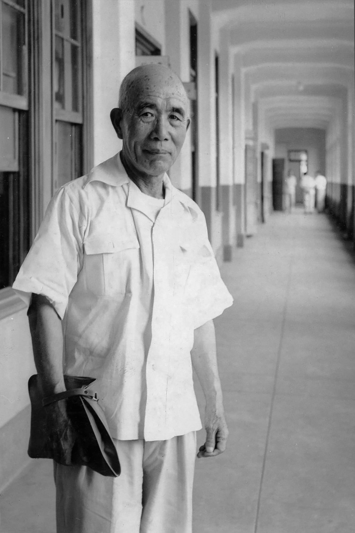 中文（台灣）: 磯永吉先生